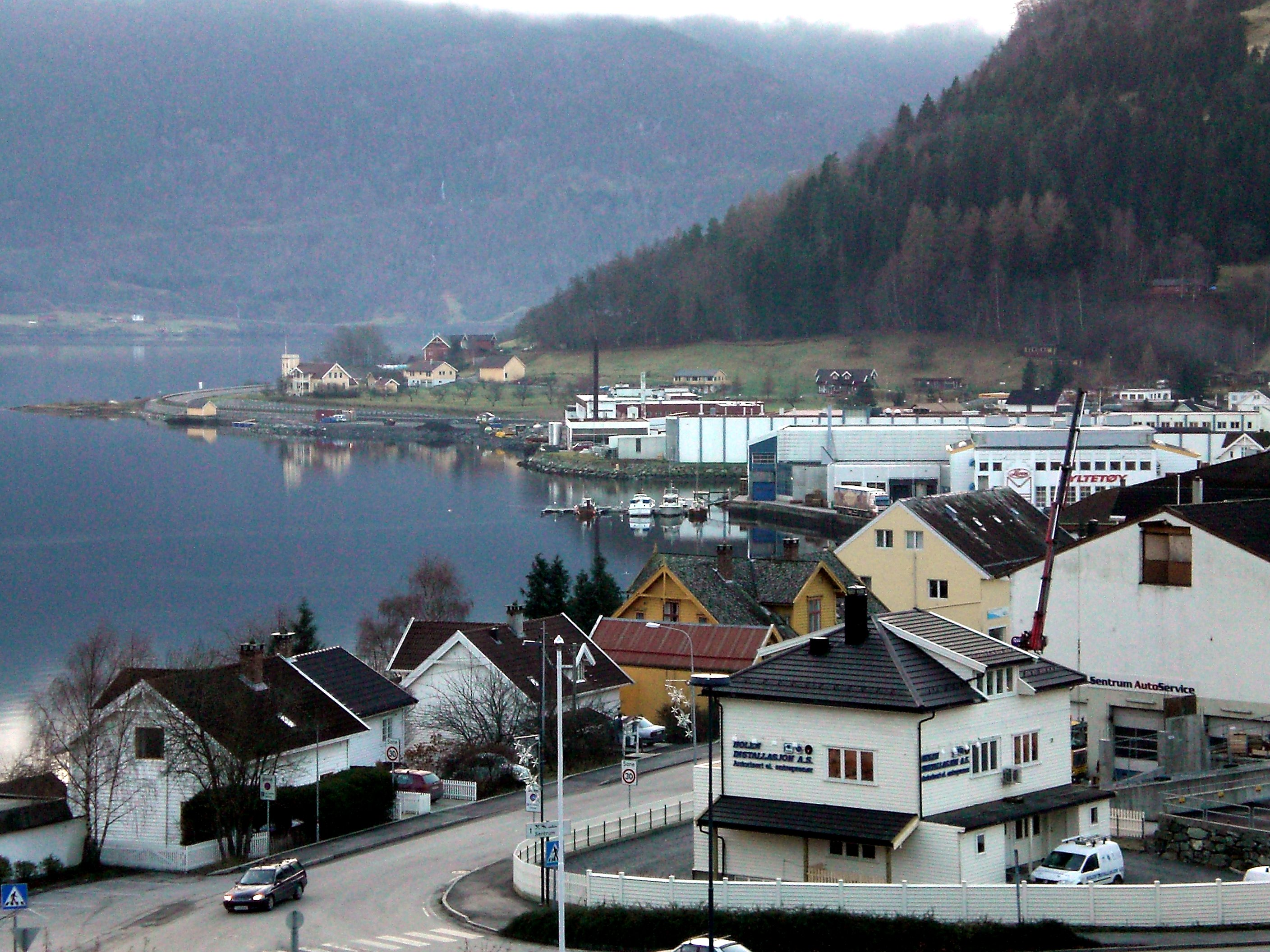 Sogndal, Sogn og Fjordane, Norway